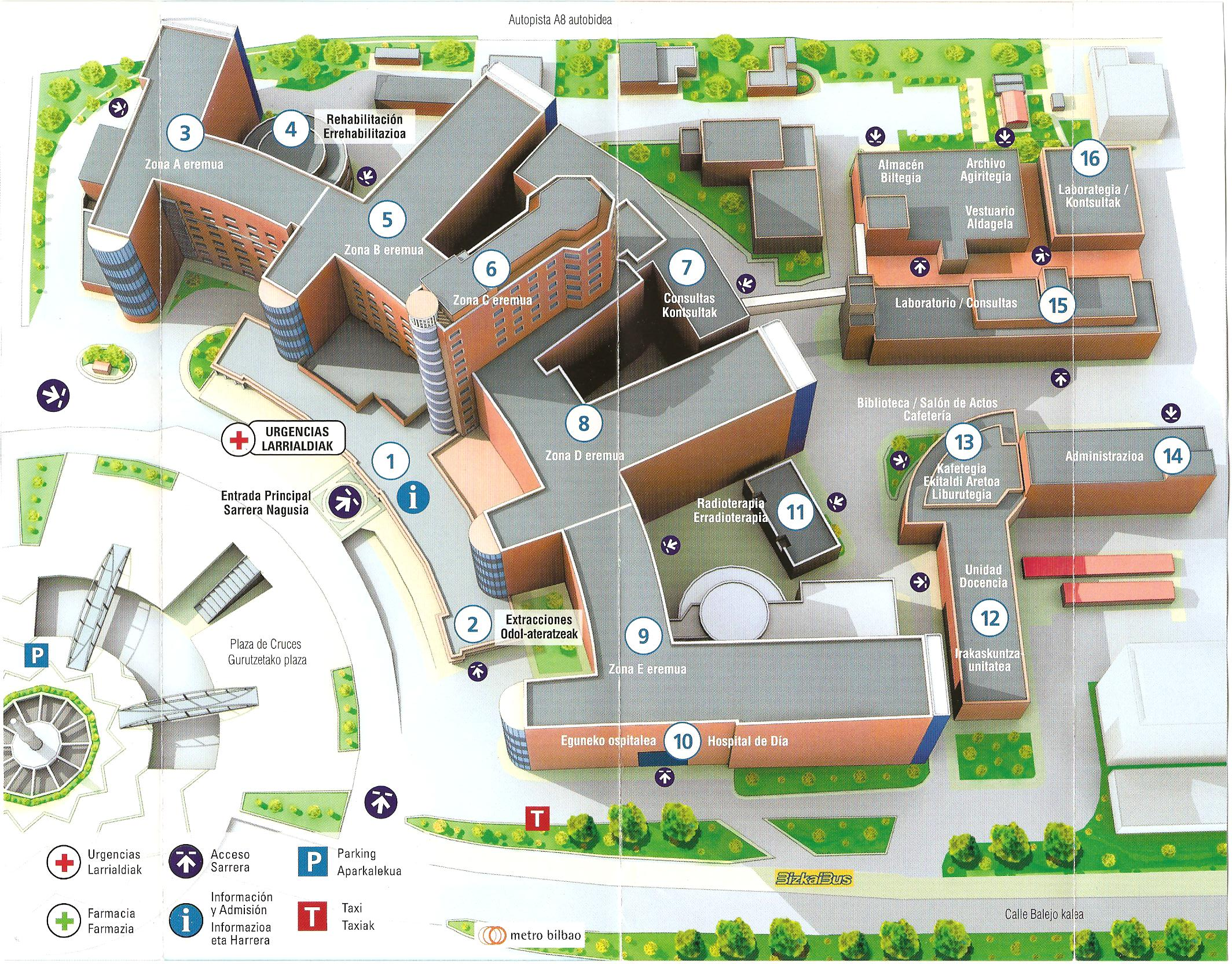 Gurutzetako Erietxea, Gurutzeta, Barakaldo, Bizkaia, Euskadi.